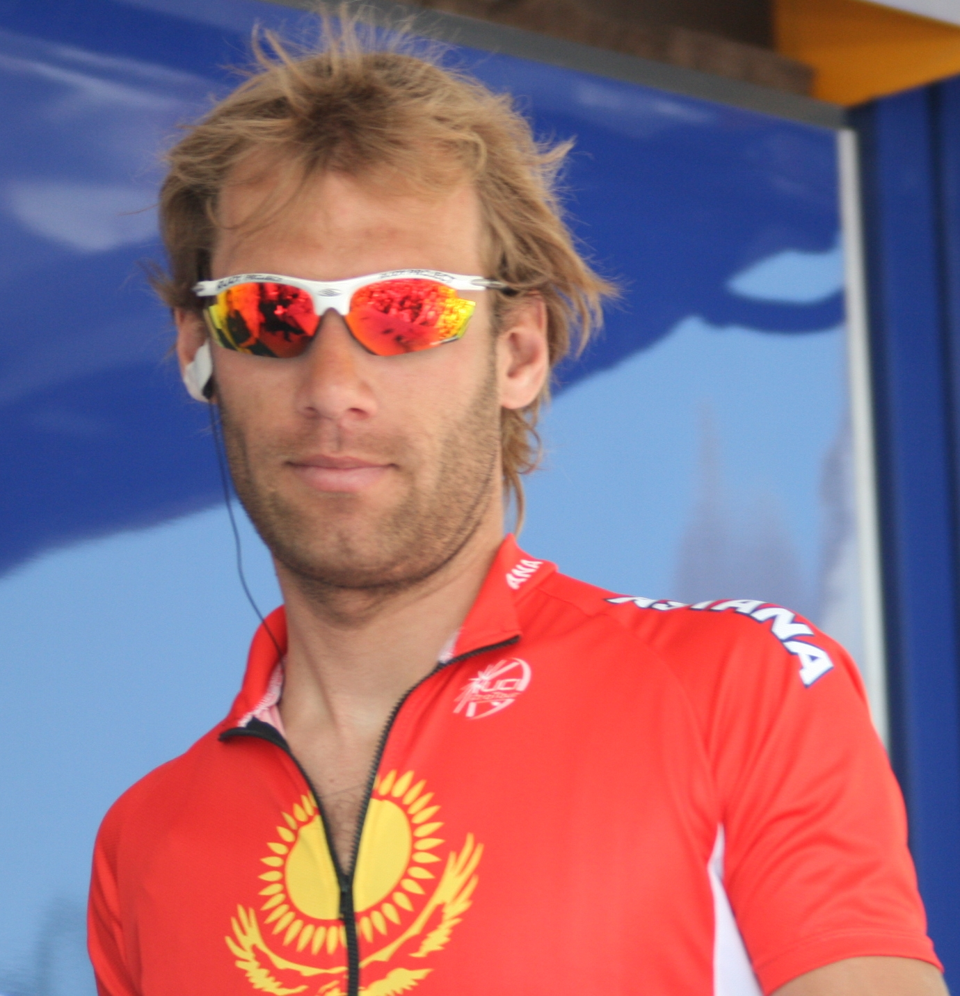 Benoît Joachim aux Quatre jours de Dunkerque 2008